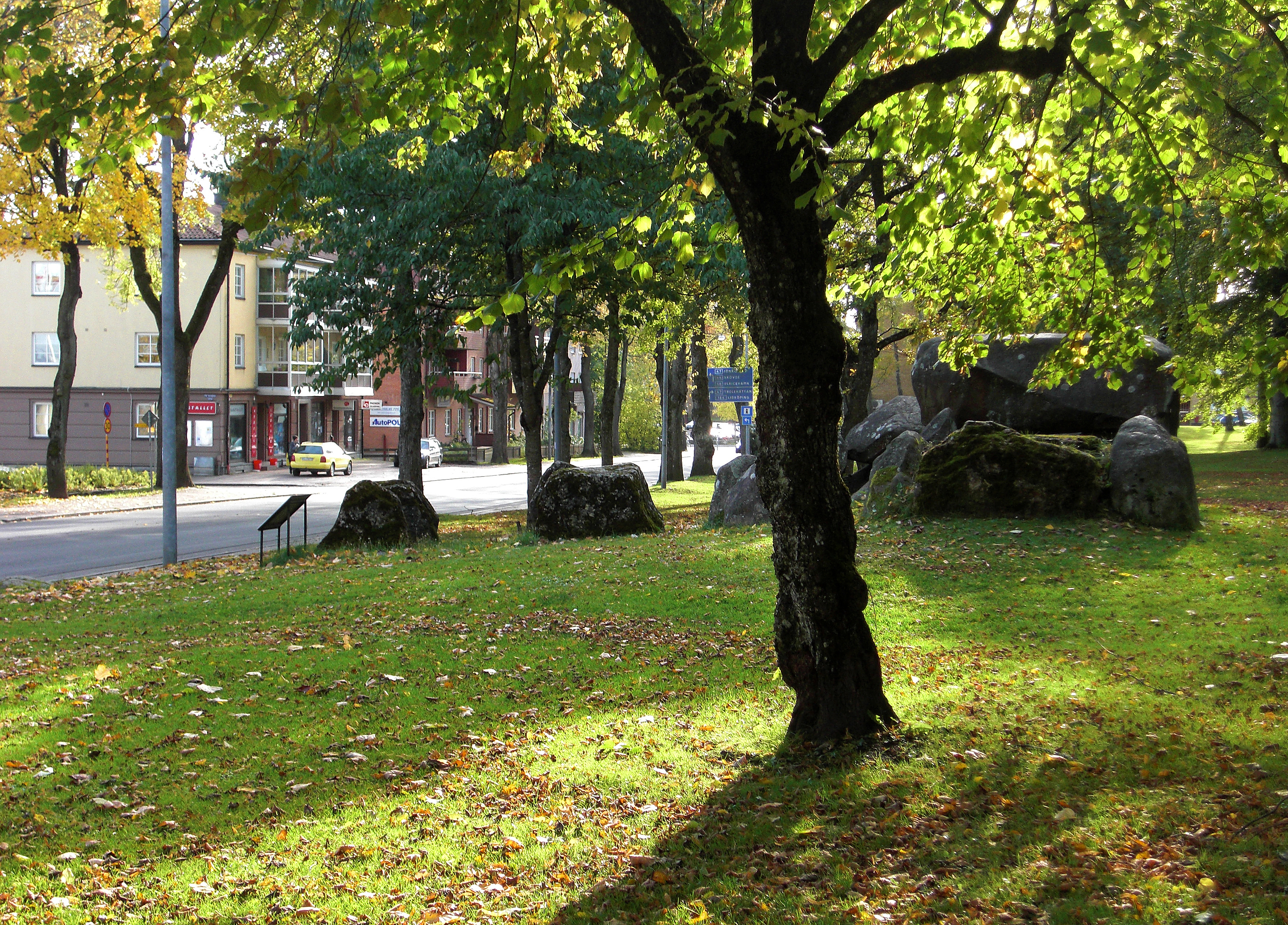 Den neolitiska gånggriften Kyrkerör (RAÄ-nr Falköping 28:1) i Planteringsförbundets park (Plantis), Falköping, Falköpings kommun, f.d. Skaraborgs län, Västergötland, Västra Götalands län, Sverige. Till vänster ses Sankt Olofsgatan och ABF-huset på Sankt Olofsgatan 18.